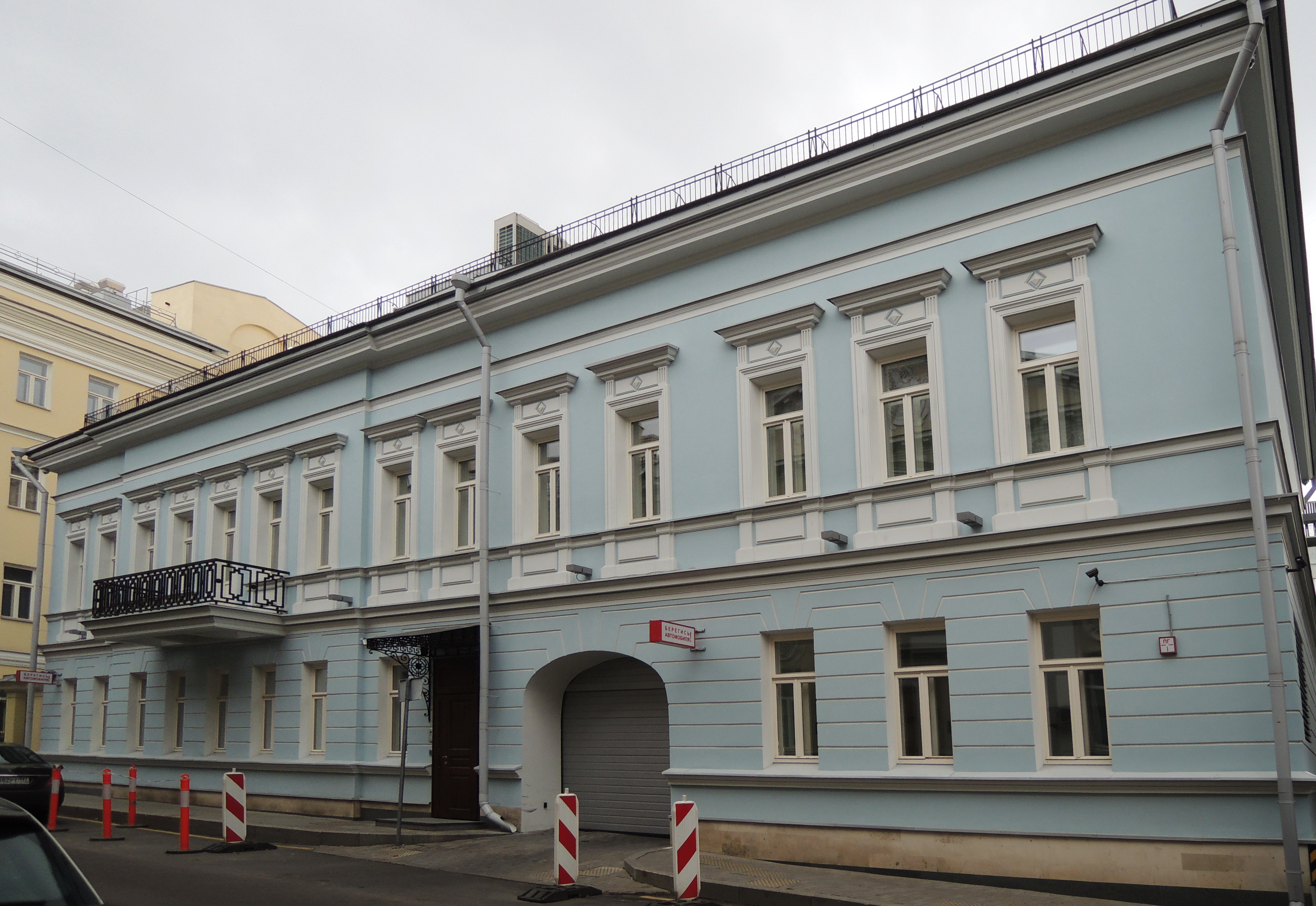 М. Знаменский переулок